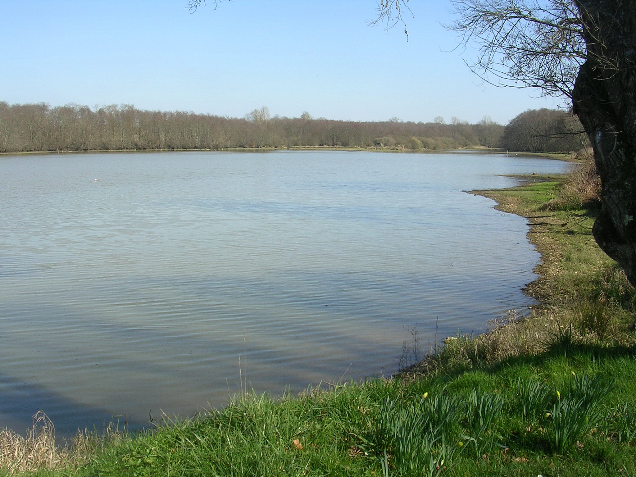 Grand étang d'Hontanx, dans le département français des Landes